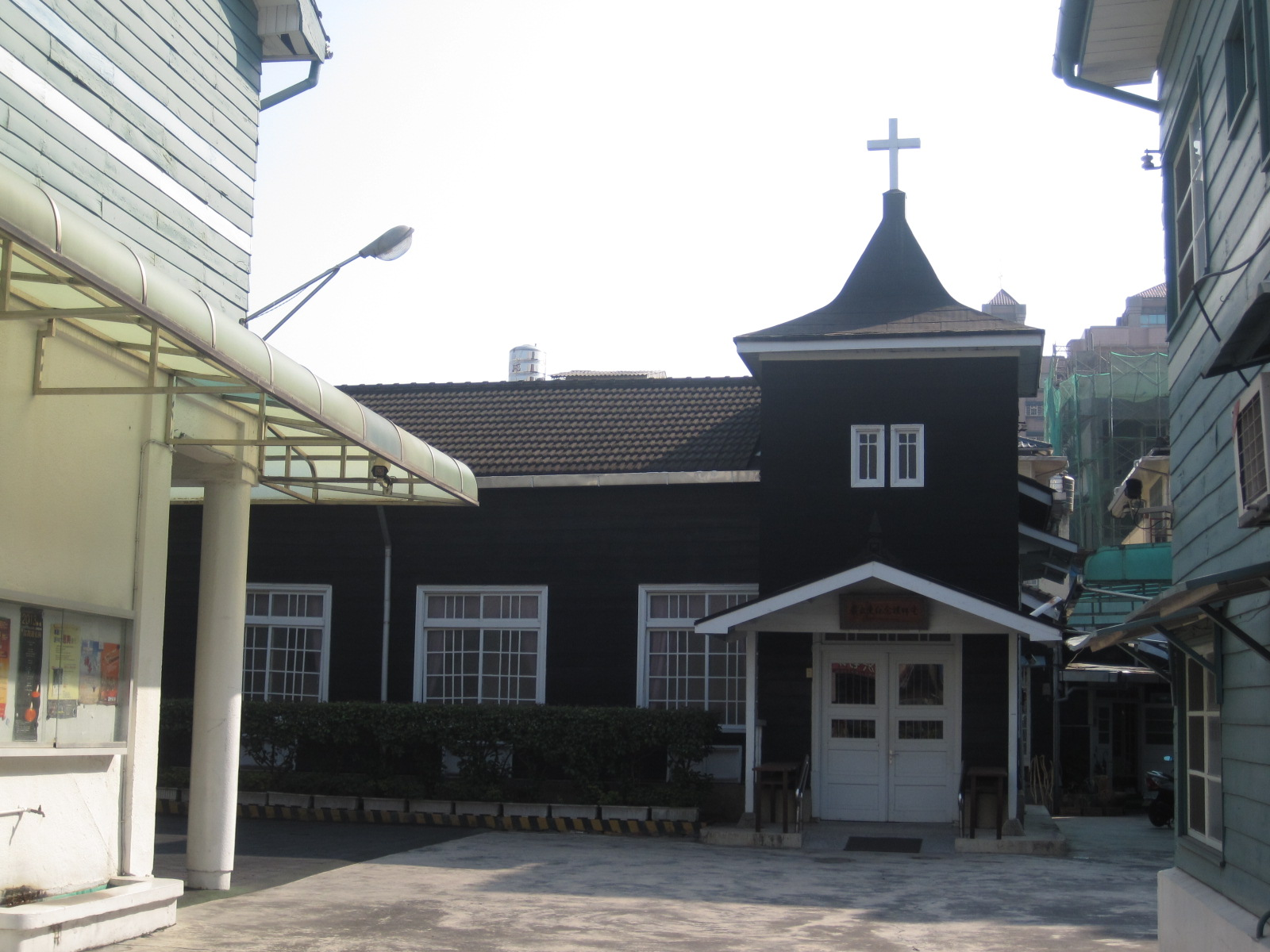 嘉義西門長老教會禮拜堂